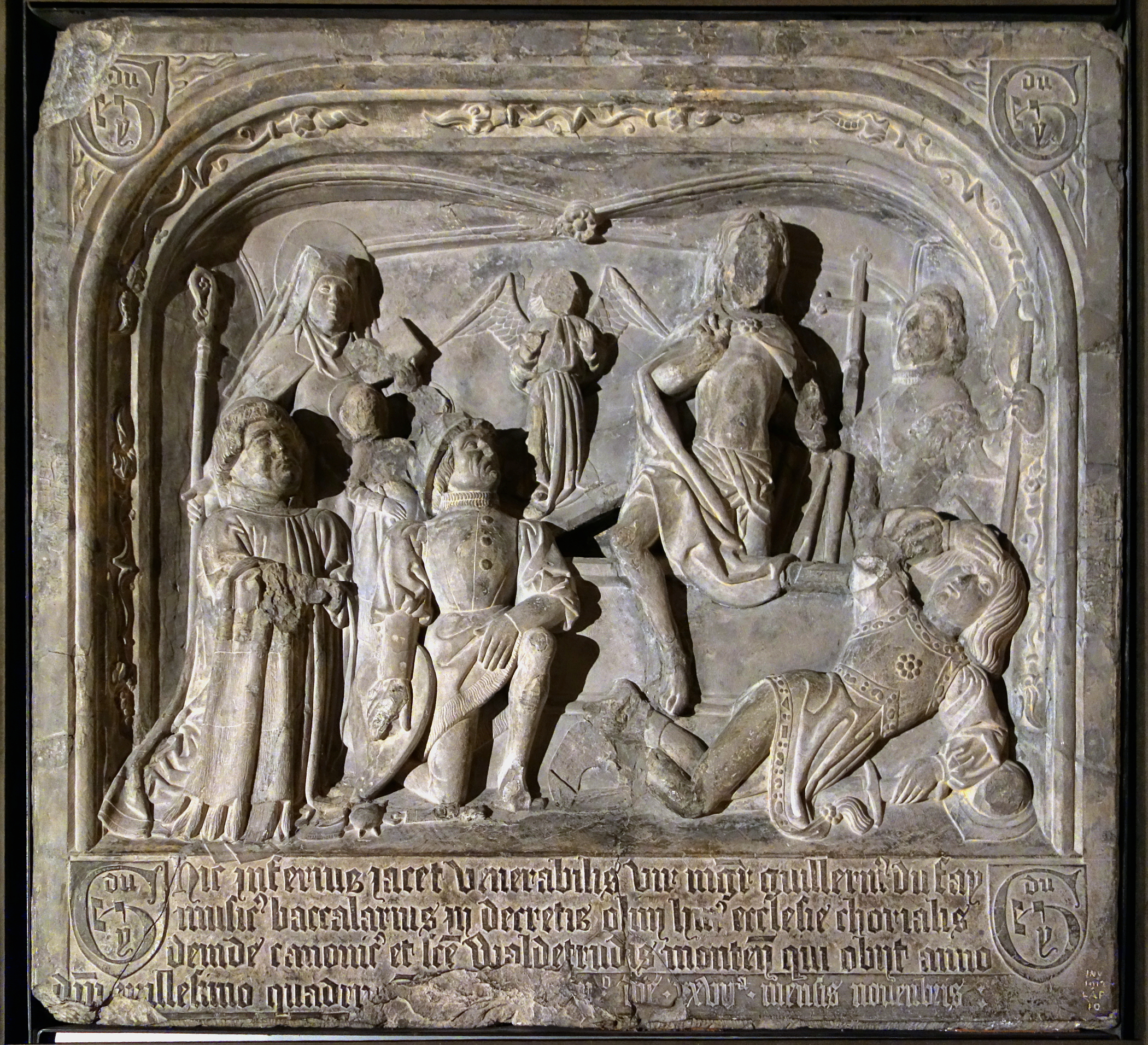 Epitaphe de Guillaume Du Fay au Palais des beaux-arts de Lille.